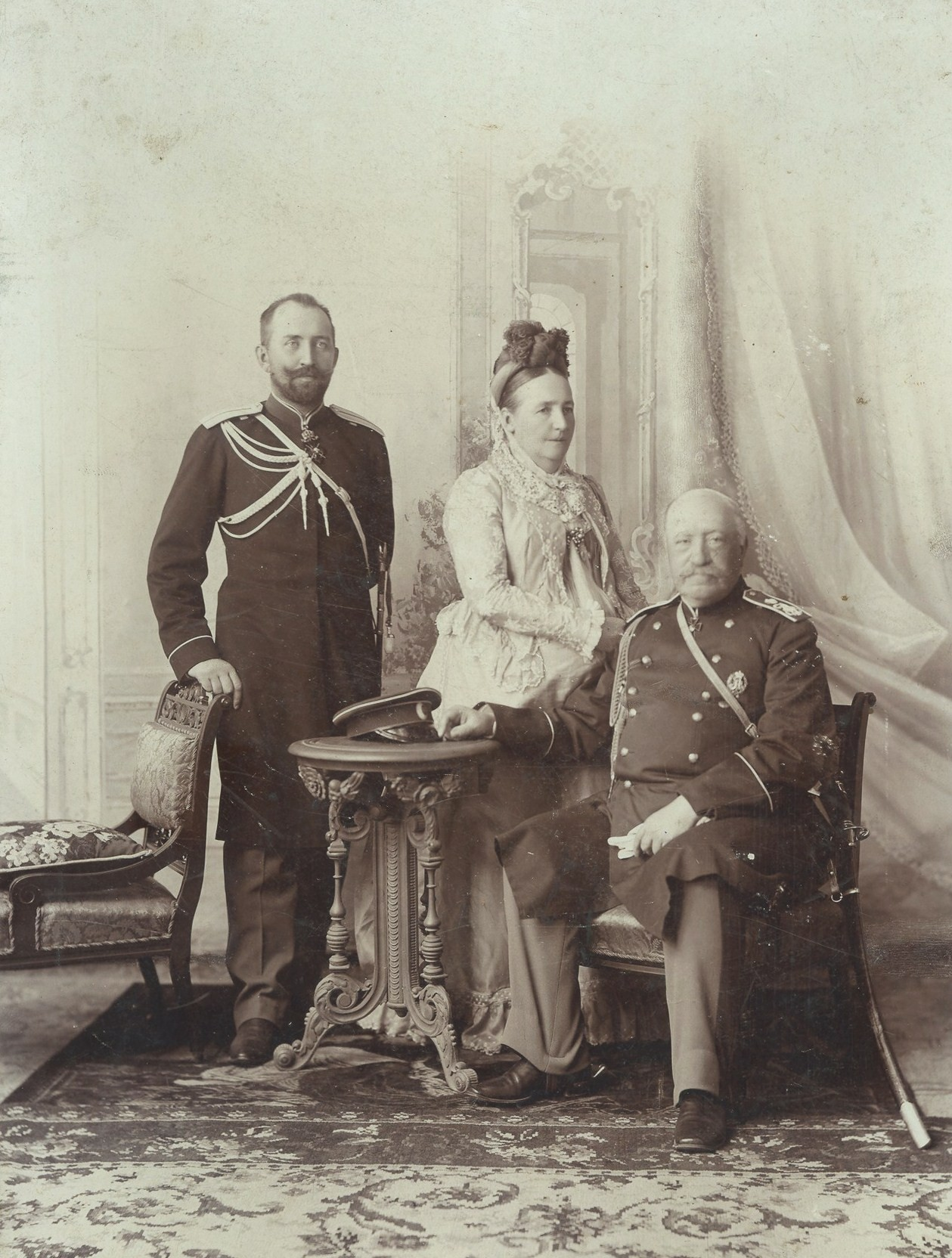 Граф Николай Павлович Игнатьев с женой Екатериной Леонидовной, ур Голицыной и сыном Леонидом